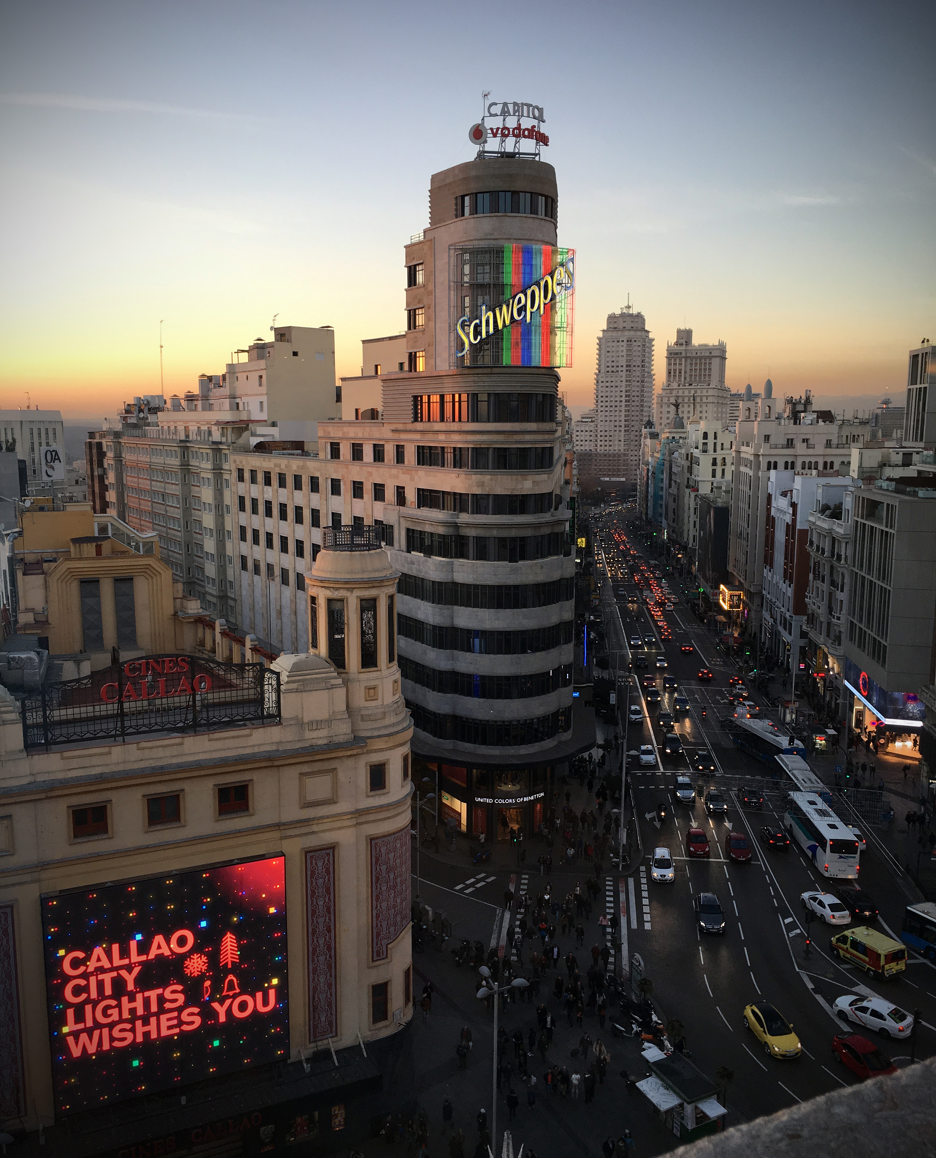 El edificio Capitol en la esquina de la Plaza del Callao y Gran Vía, en pleno centro de Madrid. Atardecer del 22 de diciembre de 2015 a las 17:48, momento exacto del solsticio de invierno.